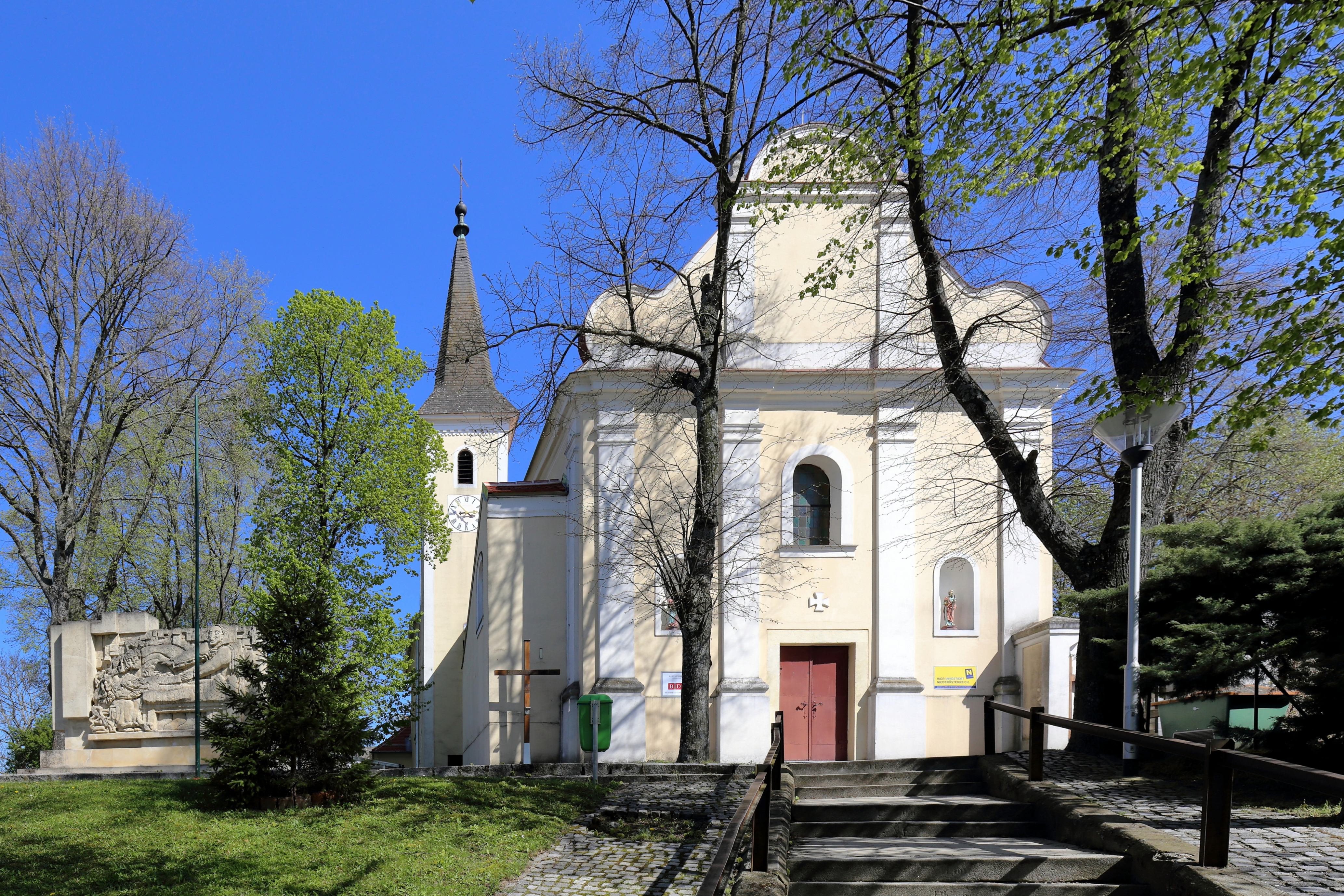 Westansicht der römisch-katholischen Pfarrkirche hll. Petrus und Paulus der niederösterreichischen Marktgemeinde Neusiedl an der Zaya.Die Kirche hat einen gotischen Baukern und wurde 1740 errichtet. Im Jahr 1844 wurde die Kirche erweitert und umgebaut.